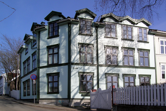 Fjellgata 13, Rodeløkka, Oslo, Norway. Built 1875.